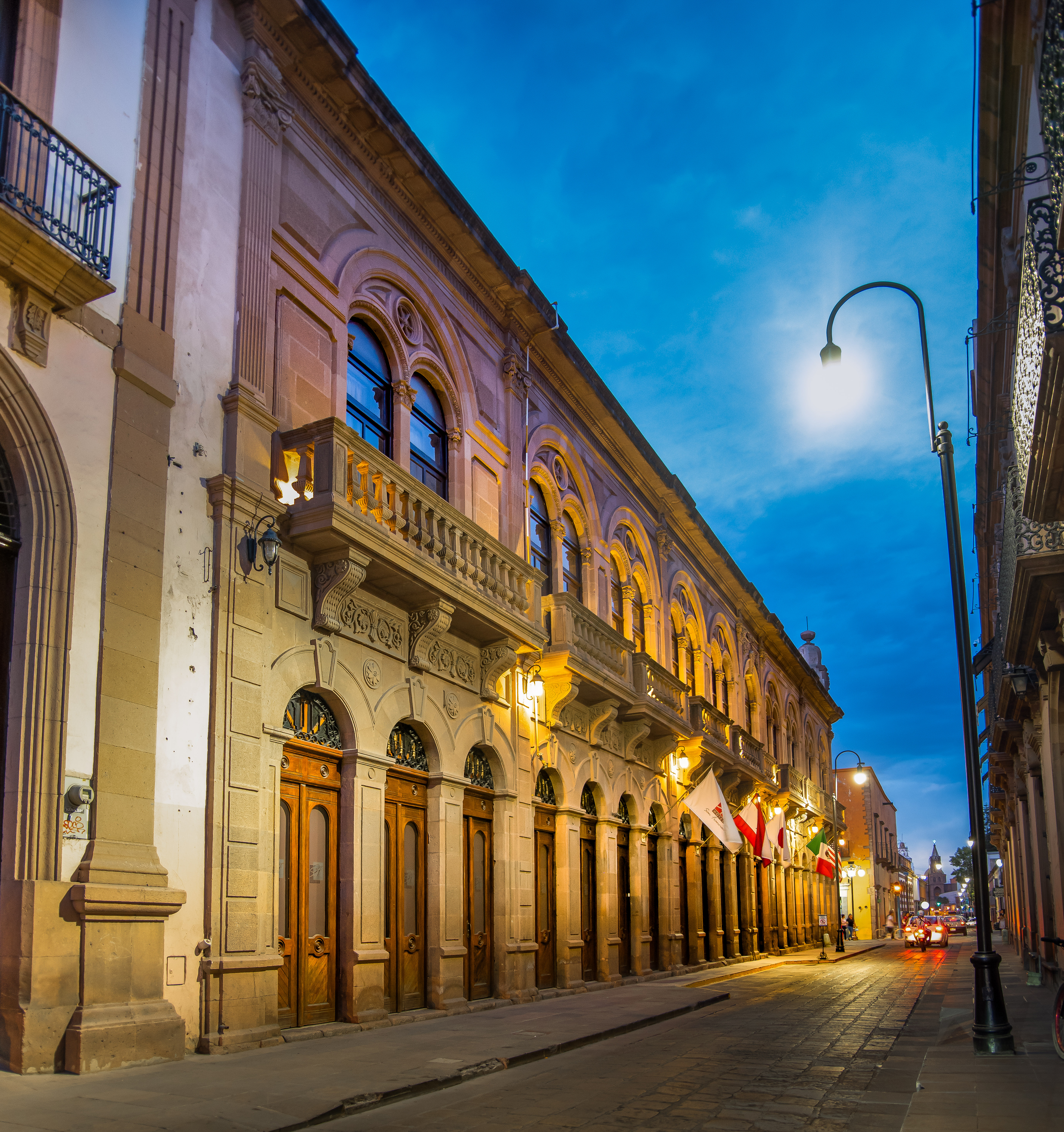 Calle universidad por la noche